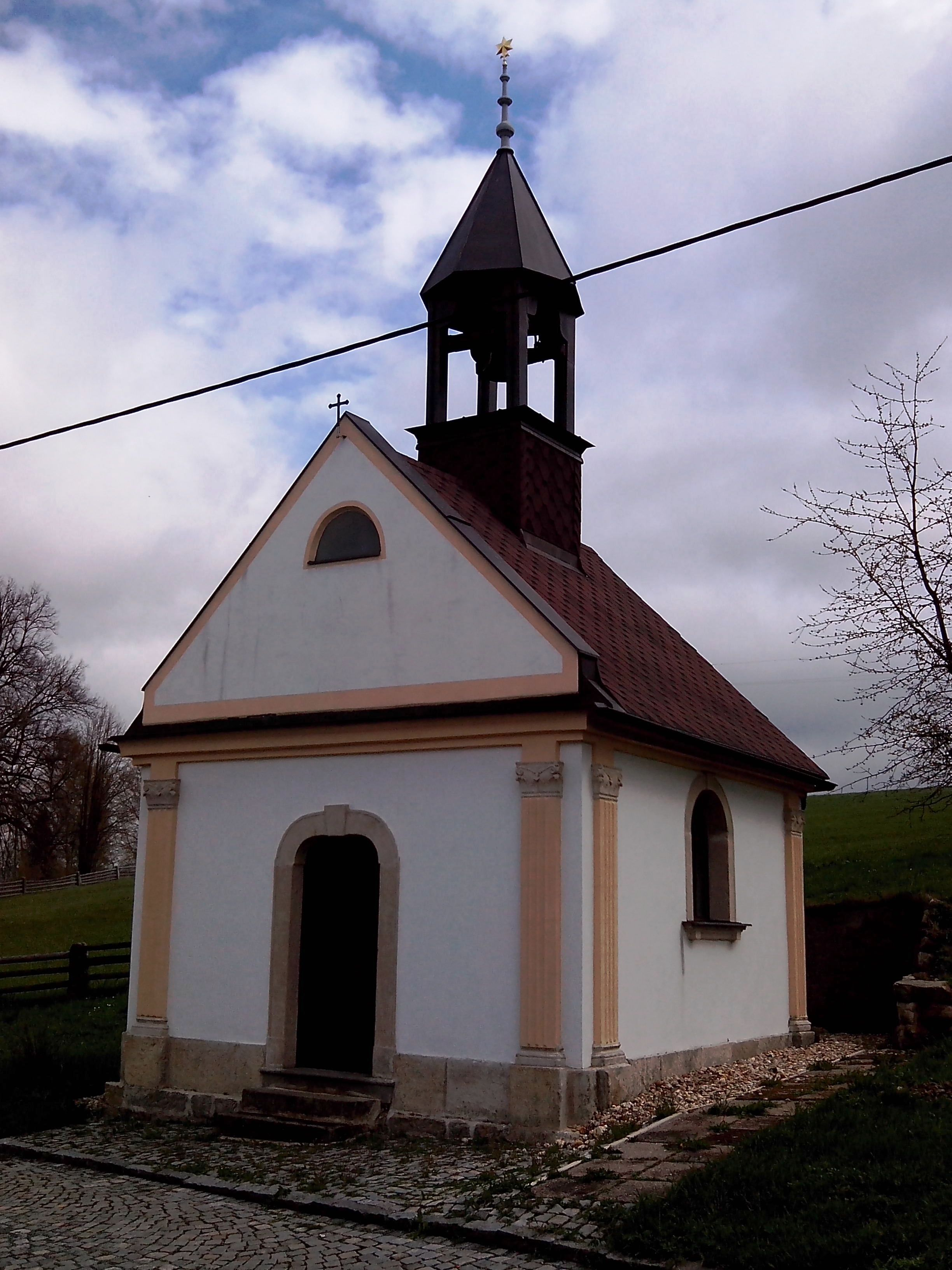 Kaple Narození Panny Marie (Vysoká Srbská)